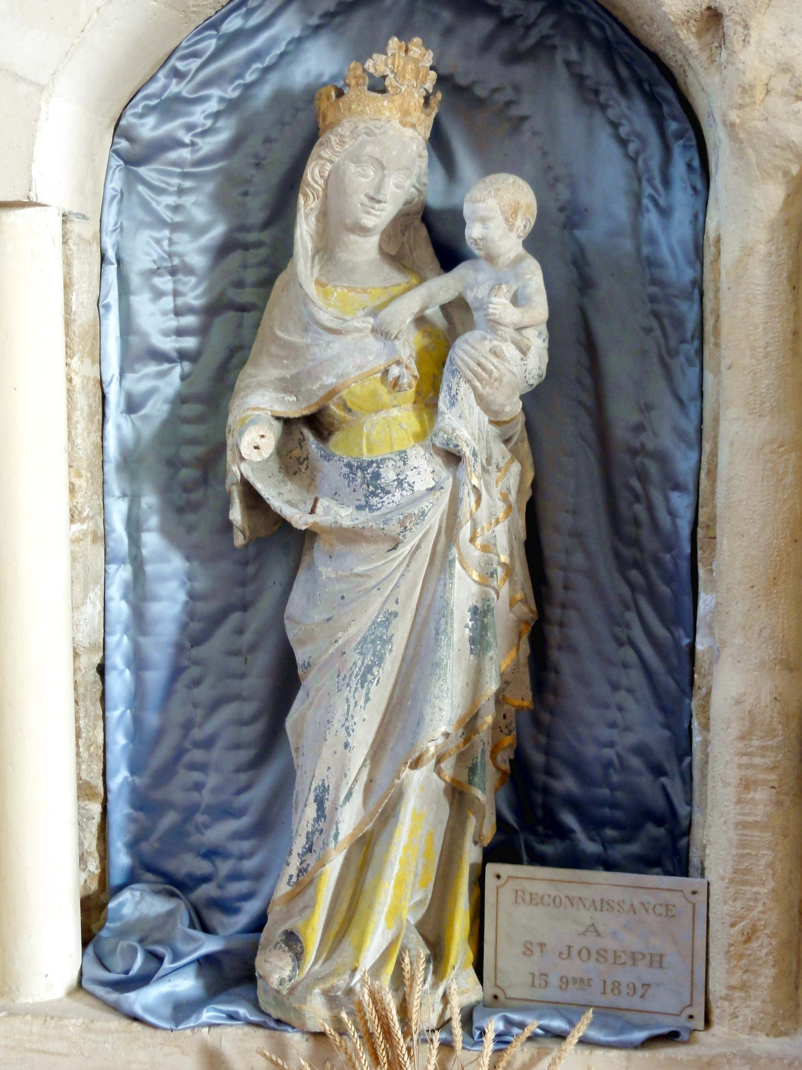 Vierge à l'Enfant en pierre du second quart du XIVe siècle.